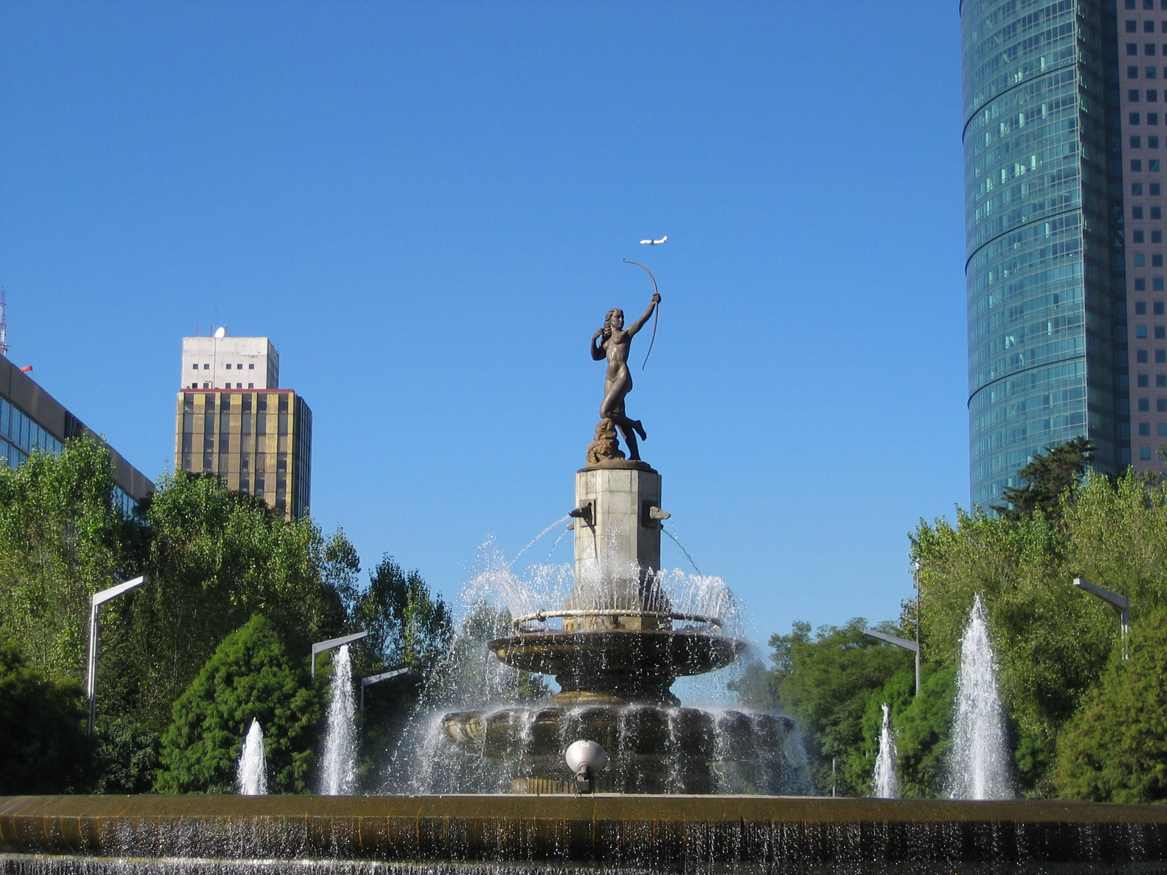 Se ve curioso el avión sobre la Diana ¿no?